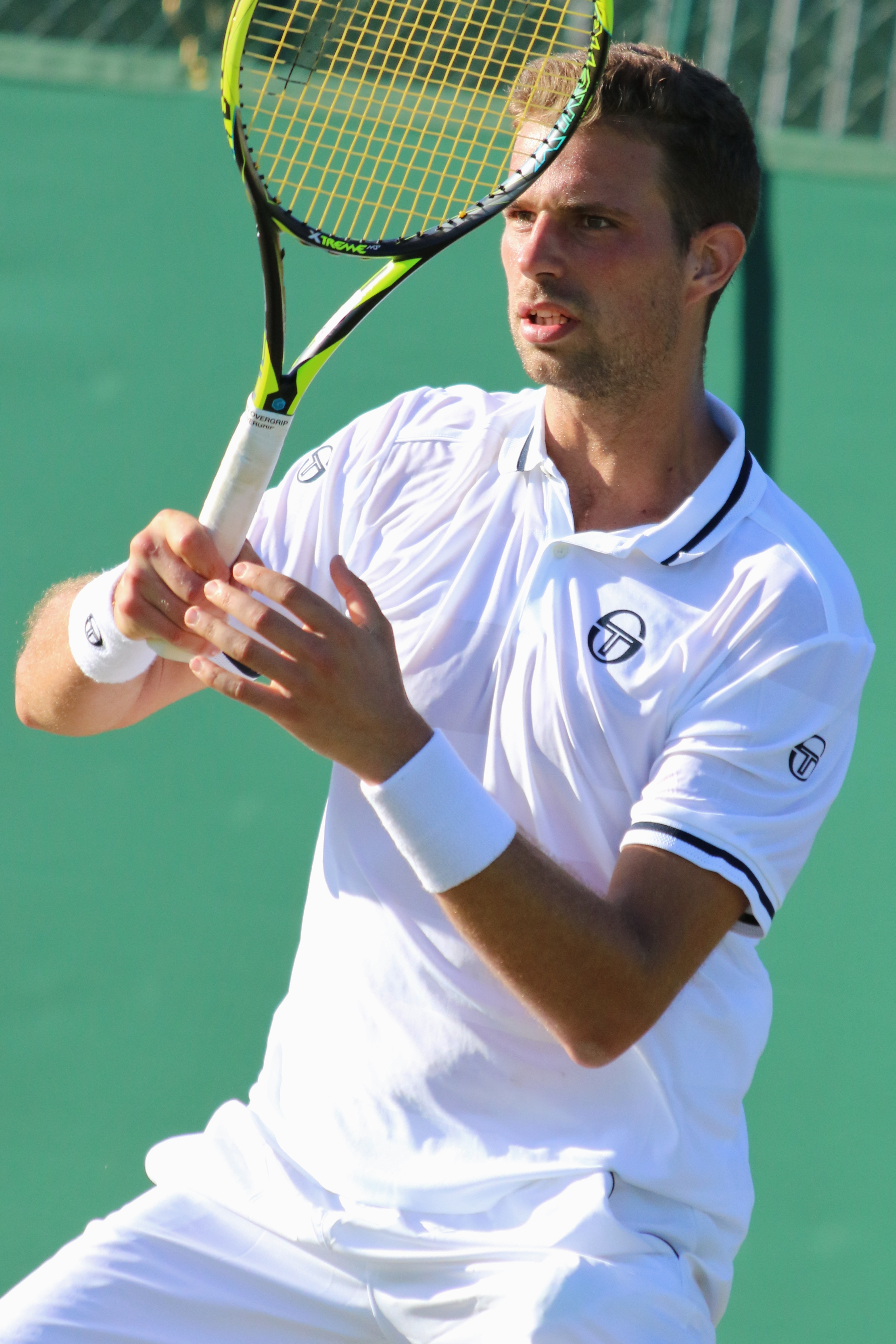 Napolitano WMQ18 (17)